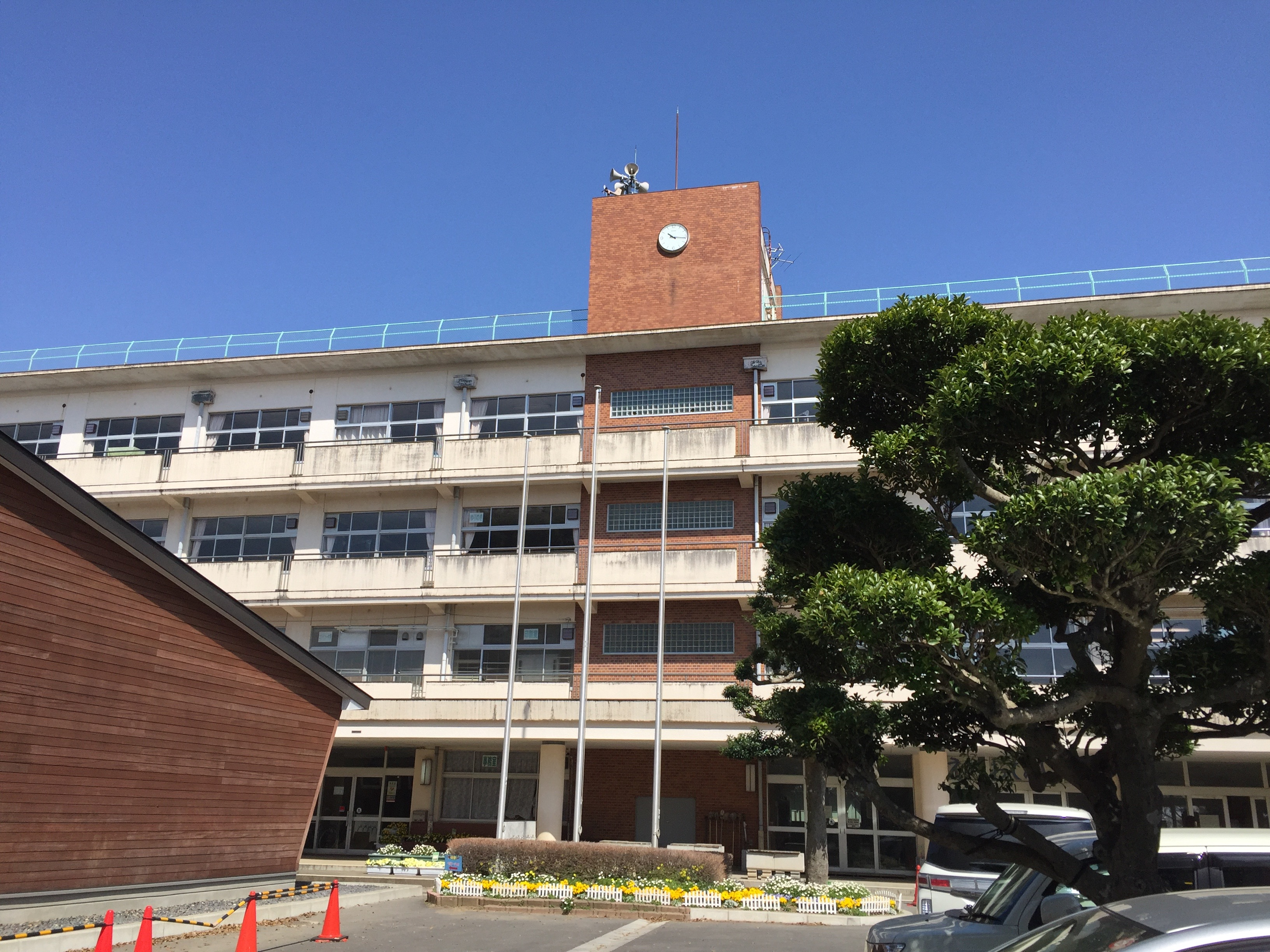 我孫子第二小学校、2016年撮影